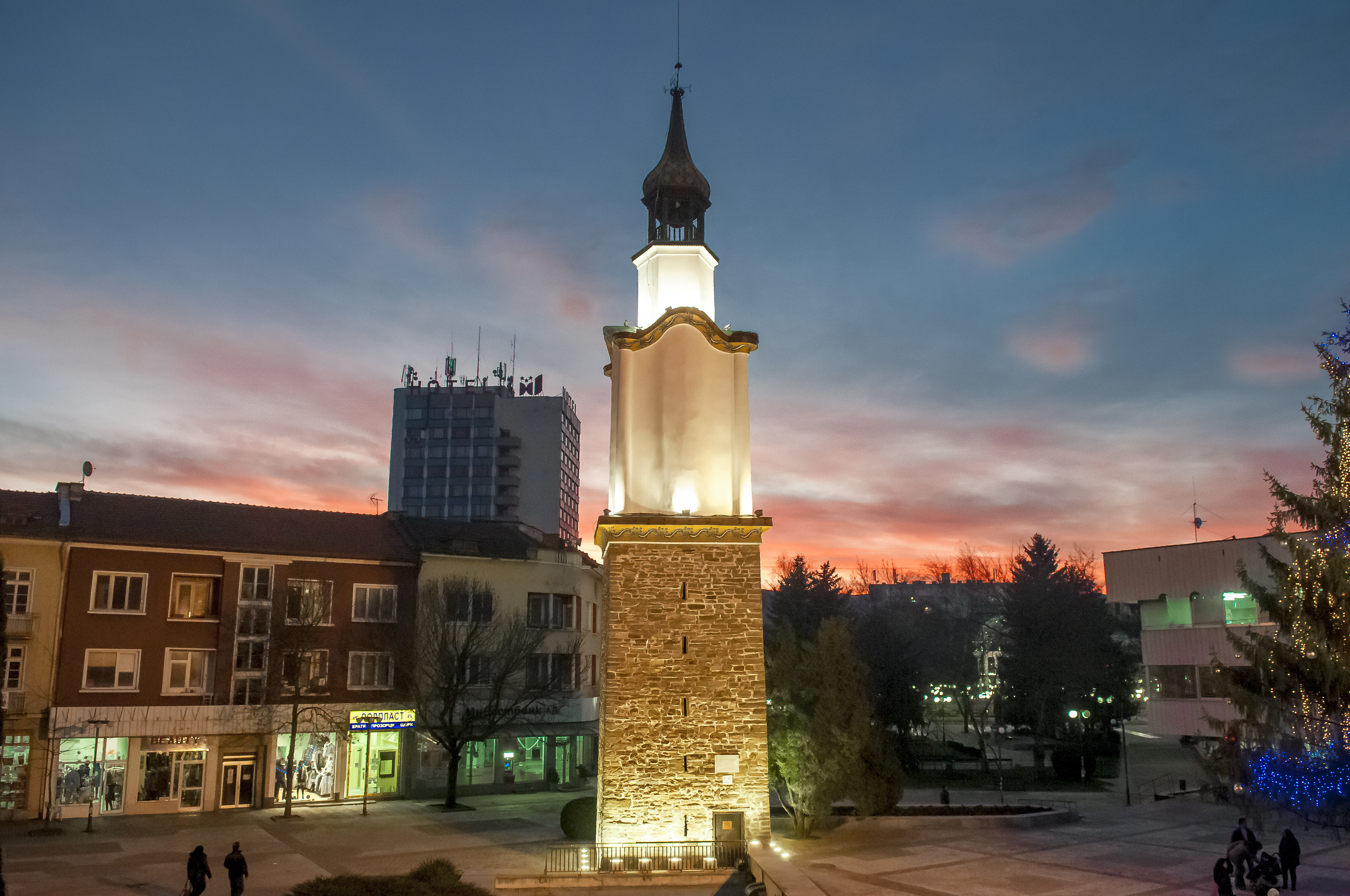 Часовникова кула в Ботевград